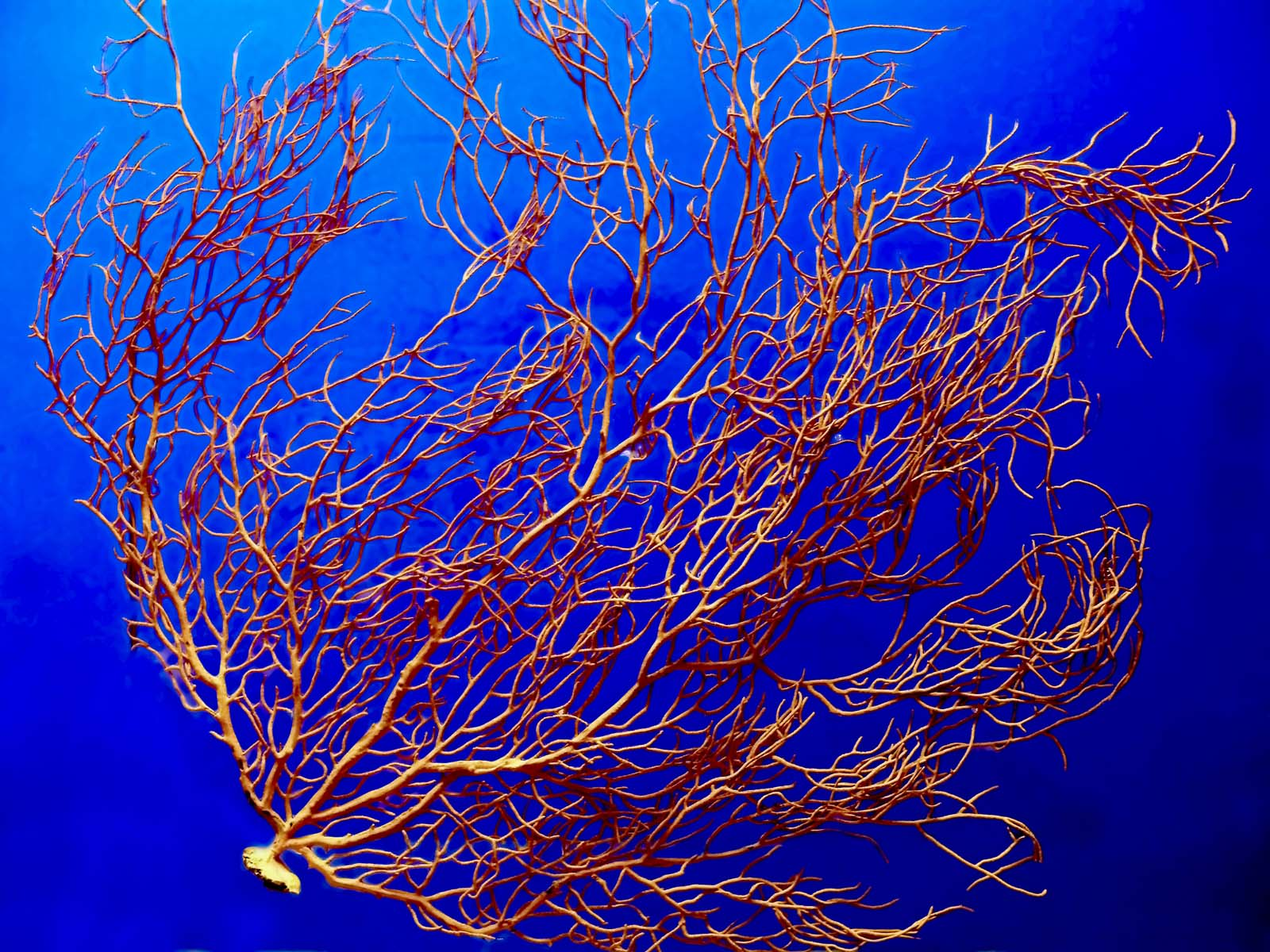 Especimen de Callogorgia verticillata (Gorgonia) expuesto en el Museo Nacional de Ciencias Naturales de Madrid